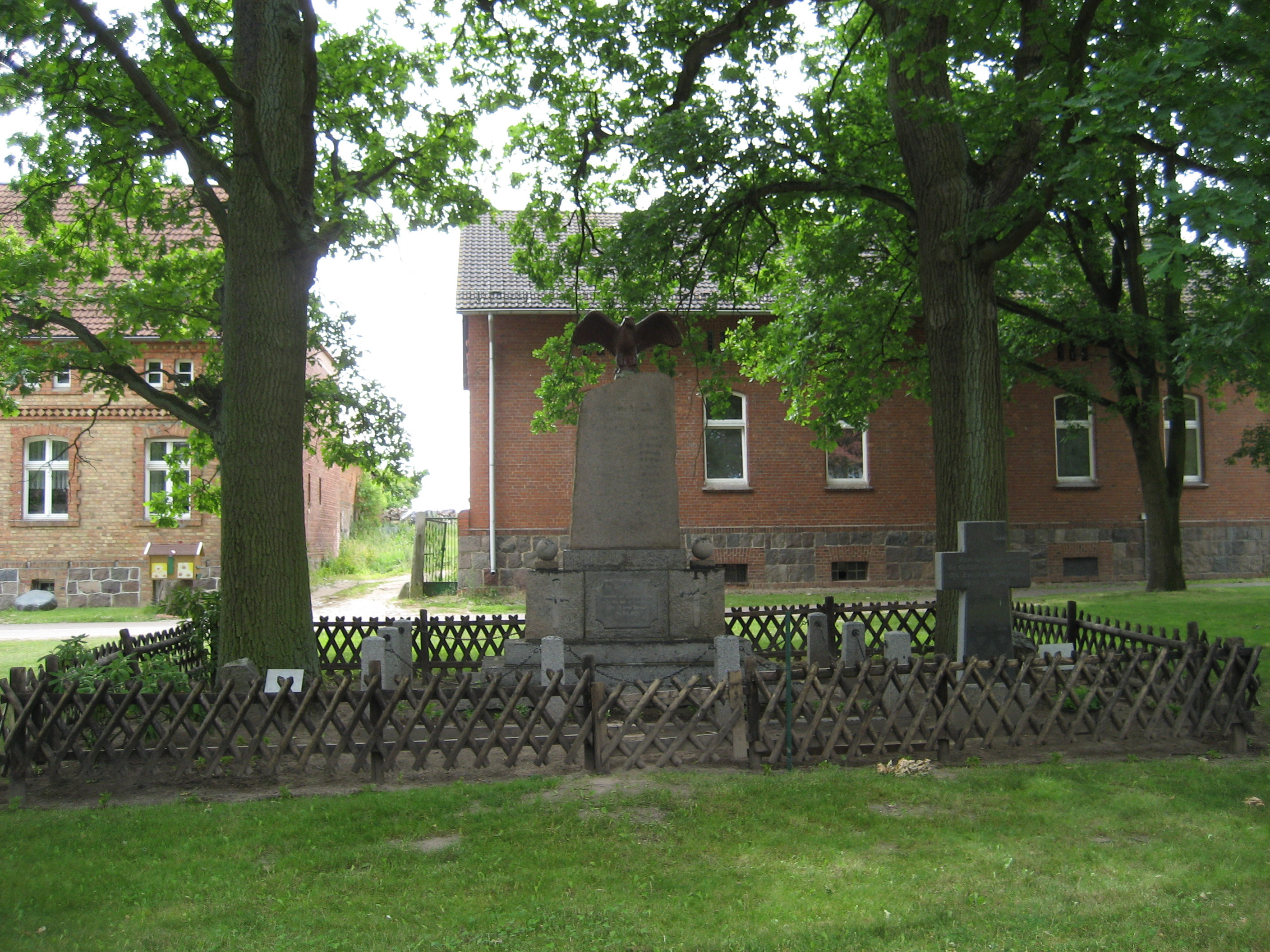 Gemeinsamer Erinnerungsort in Bergholz mit Gedenkstein und Mahnmal für die gefallenen Soldaten und Opfer des Ersten und Zweiten Weltkrieges.